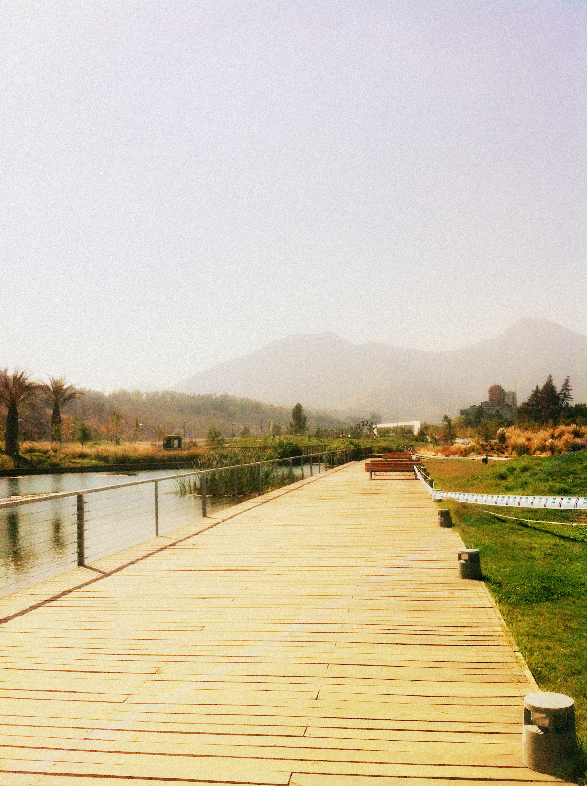 Parque Bicentenario